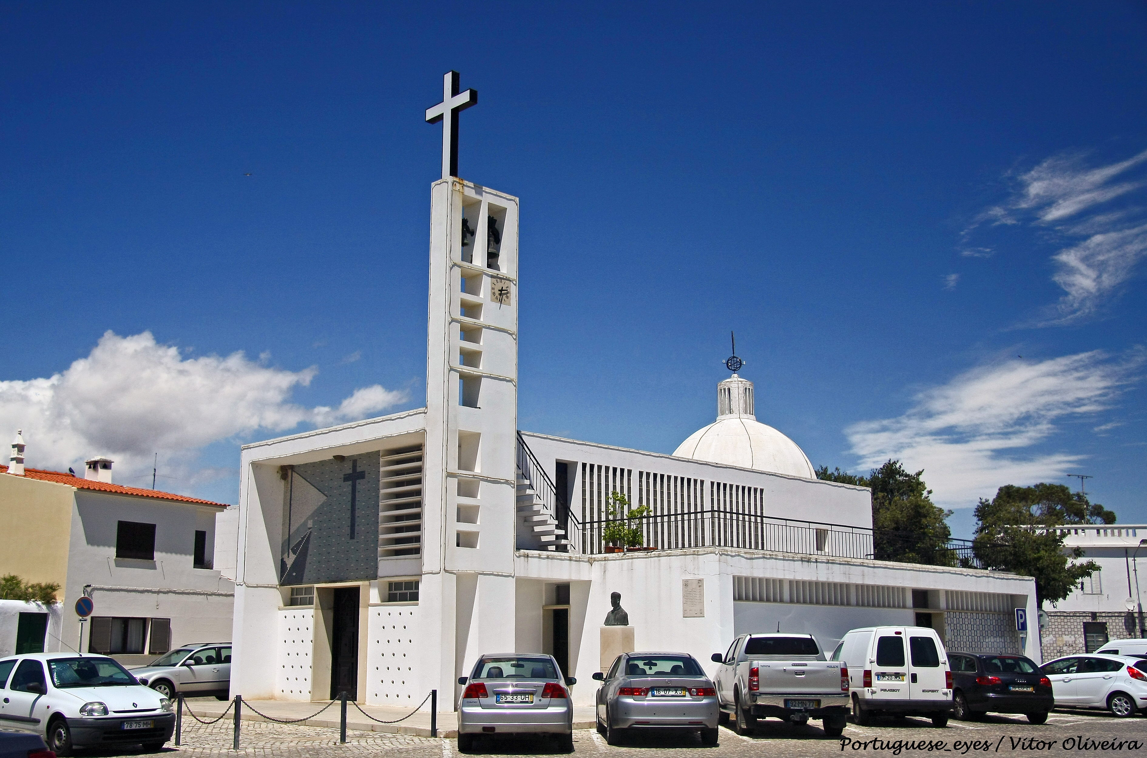 Santa Luzia - Portugal